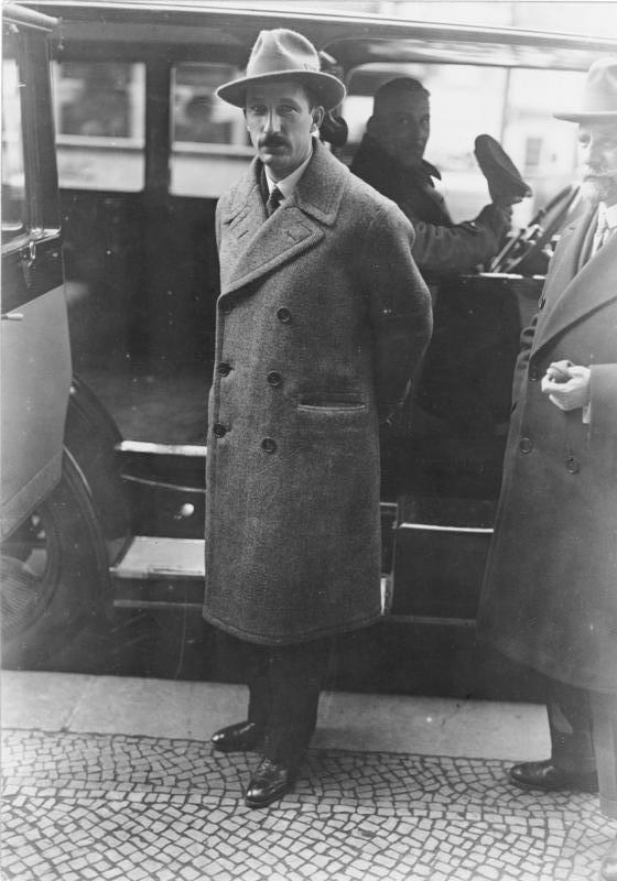 Zar Boris von Bulgarien in Berlin! Zar Boris von Bulgarien weilt augenblicklich in Berlin und wird dem Reichspräsidenten von Hindenburg einen Höflichkeitsbesuch machen. Unser Bild zeigt den Zaren Boris von Bulgarien vor dem Hotel Pristol in Berlin.